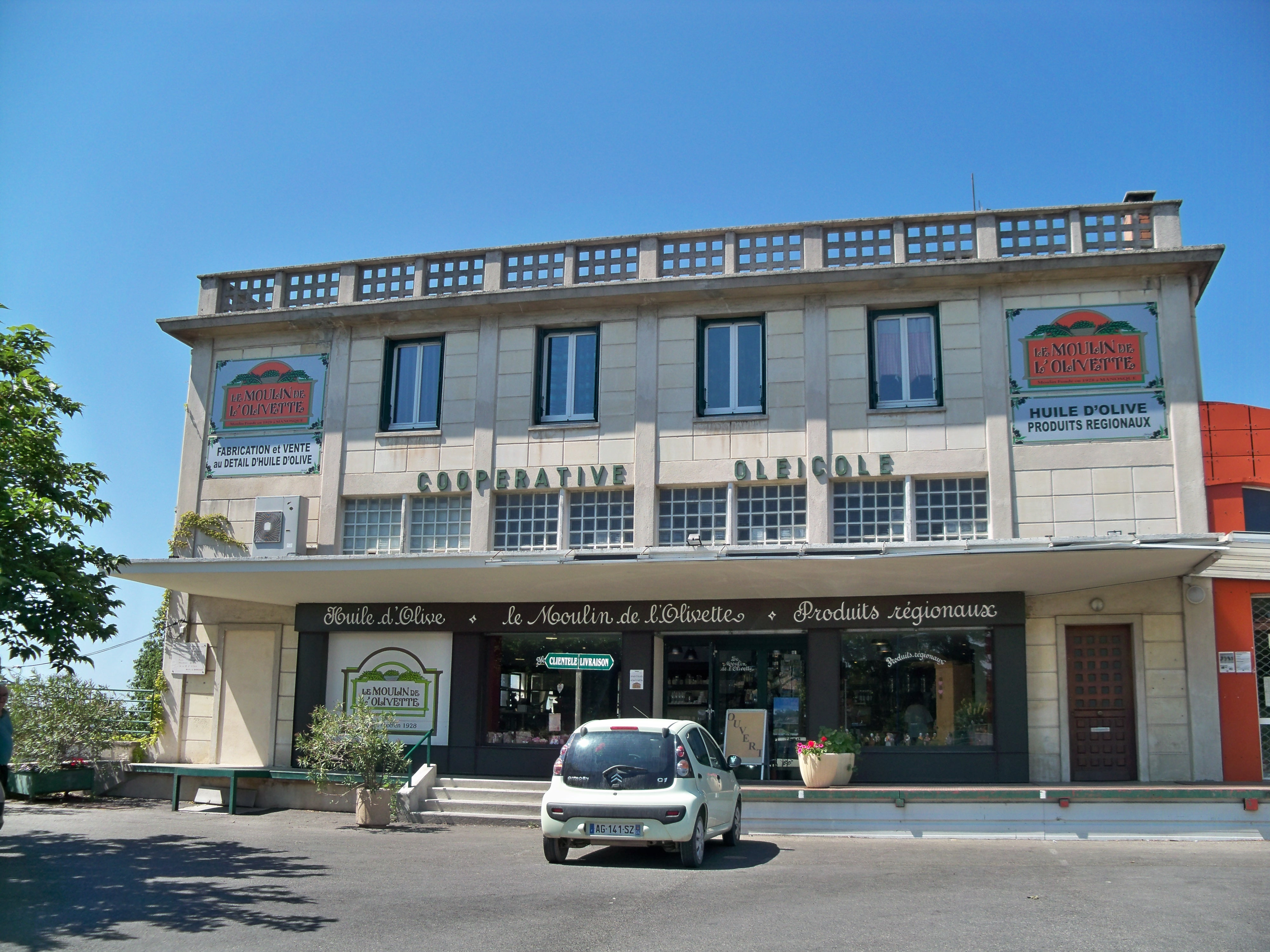 Batiment de la coopérative oléicole de Manosque (04), France